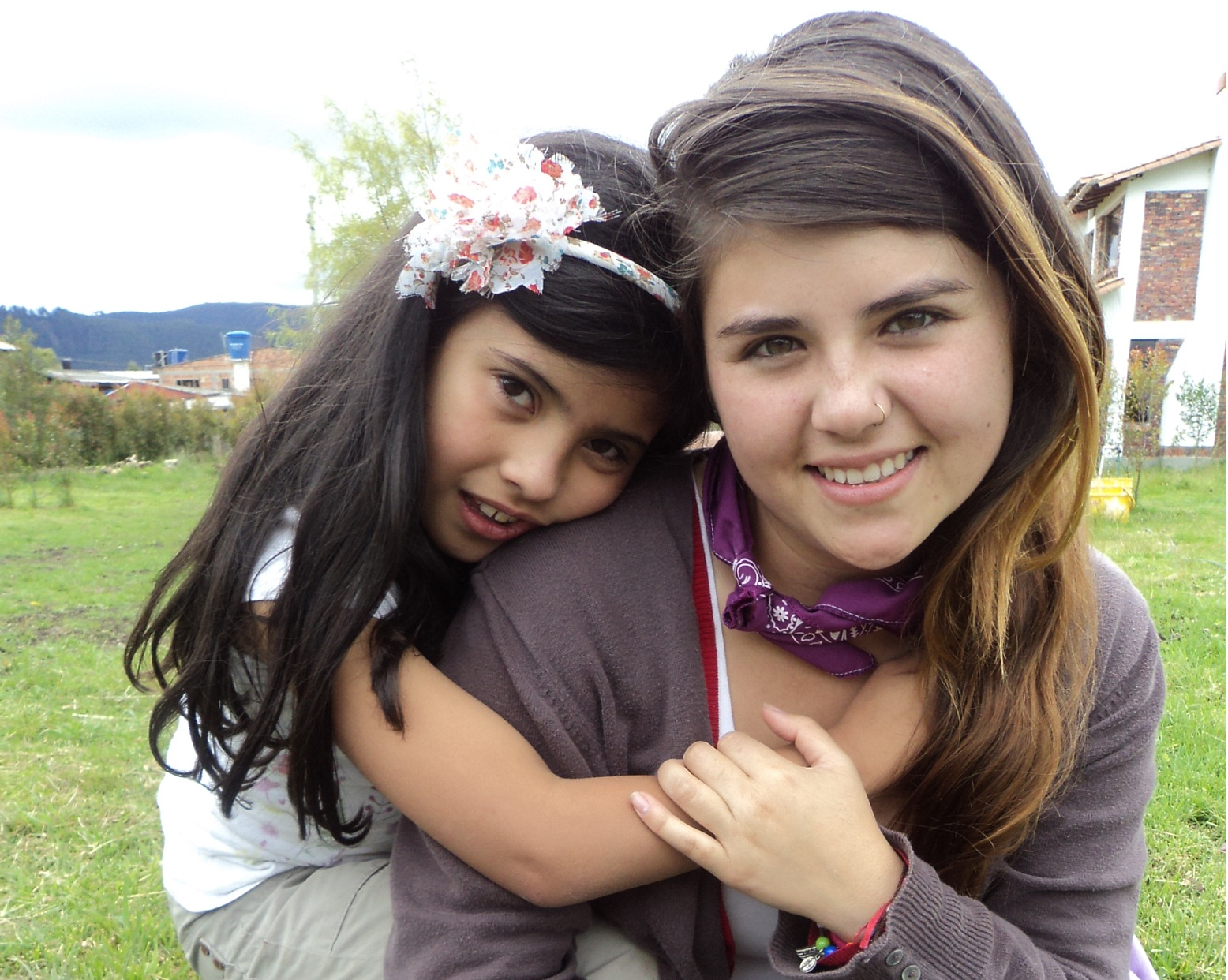 Ser Au Pair es una bella labor, te hace grande como persona, aprendes nuevos idiomas, conoces nuevos lugares y vives por más de un año con una bella familia que te acoge y lo más importante convives y cuidas de unos bellos niños que siempre necesitarán de ti.